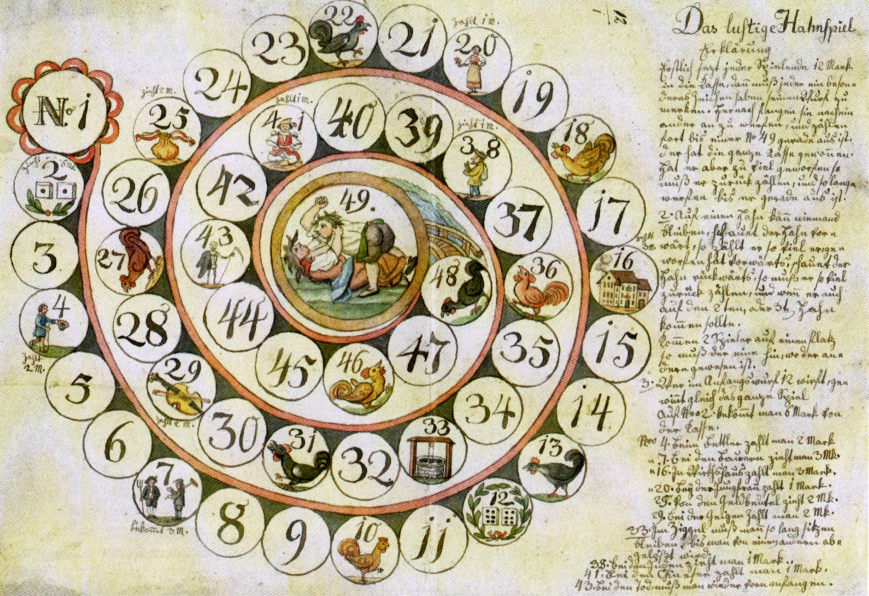 Das lustige Hahnspiel (Lustiges Hahnenspiel). Kolorierte Federzeichnung im Stadtmuseum Bruneck